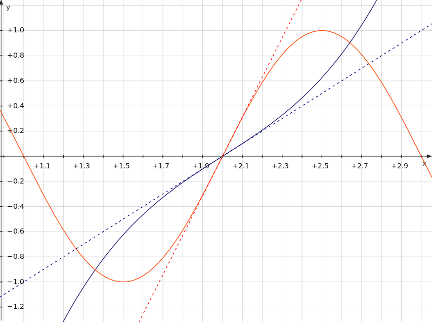 Approximation zweier Funktionen durch ihre Tangenten